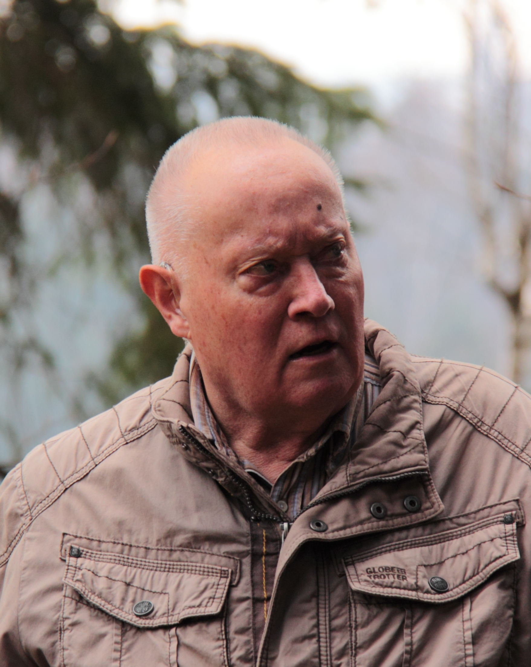 Volkmar Geupel bei einer durch ihn geführten Exkursion zum Schlossstein